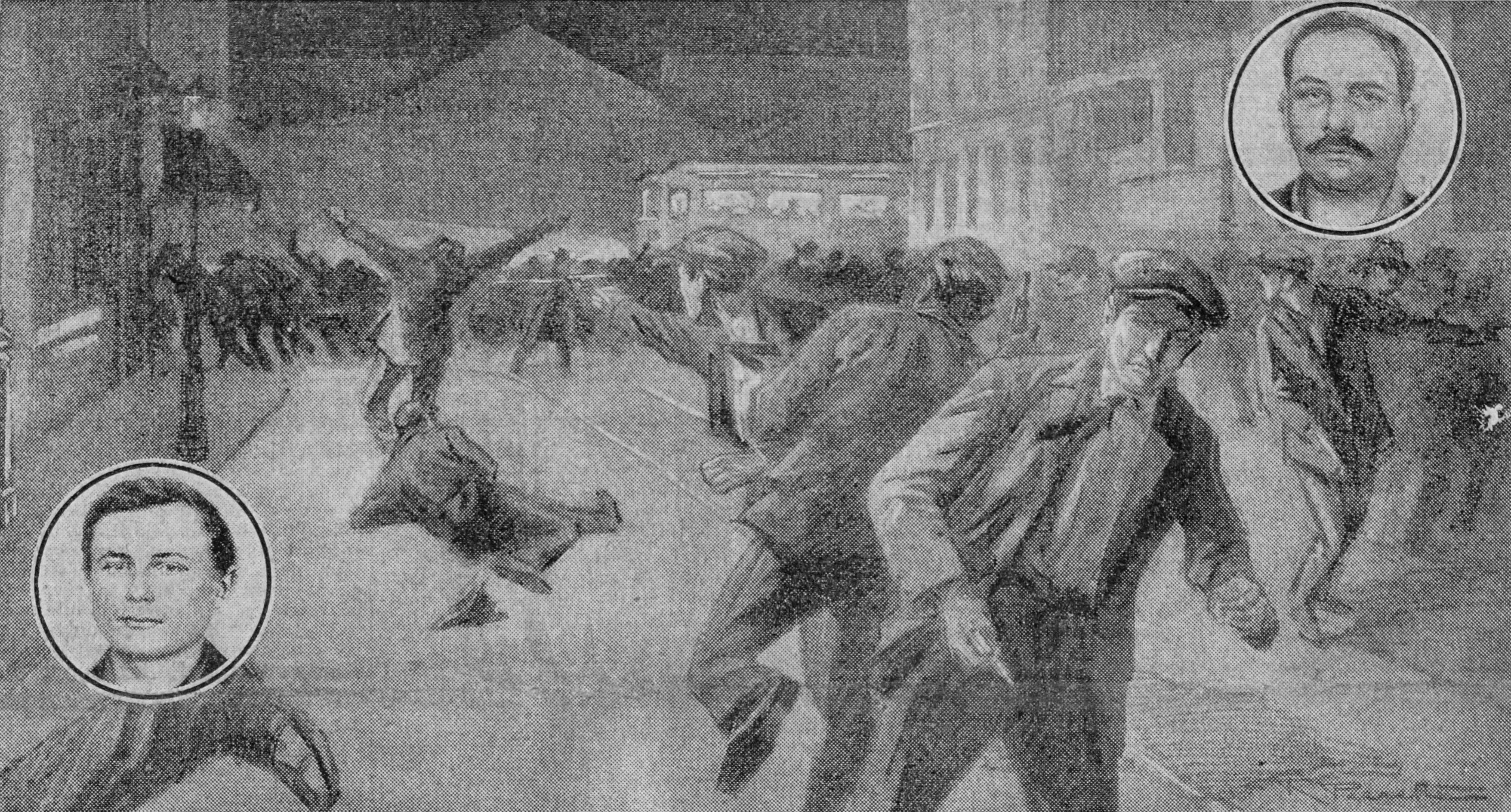 "Reconstitution de l'attentat communiste de la rue Damrémont au moment où les assassins blessent mortellement deux de leurs victimes, devant le numéro 133. - Dans les médaillons : deux des meurtriers : à gauche, Marc Bernardon ; à droite, Jean Clert."